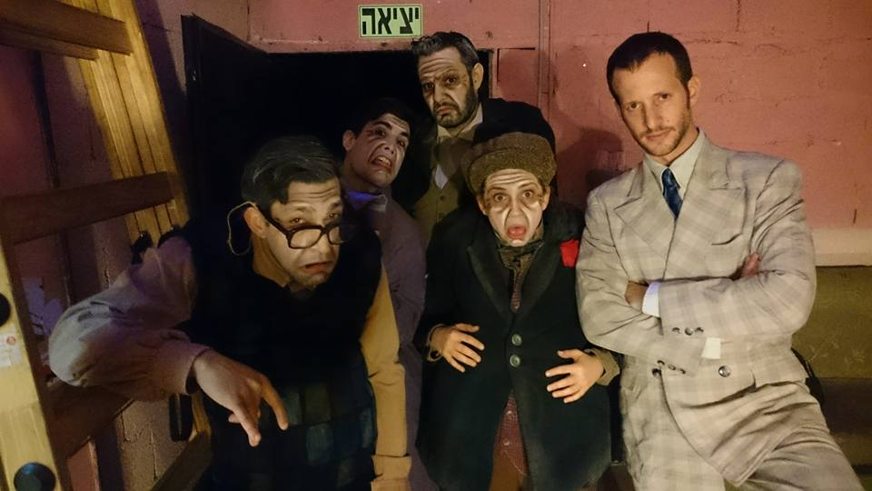 שחר רז בהצגה "התקלה"